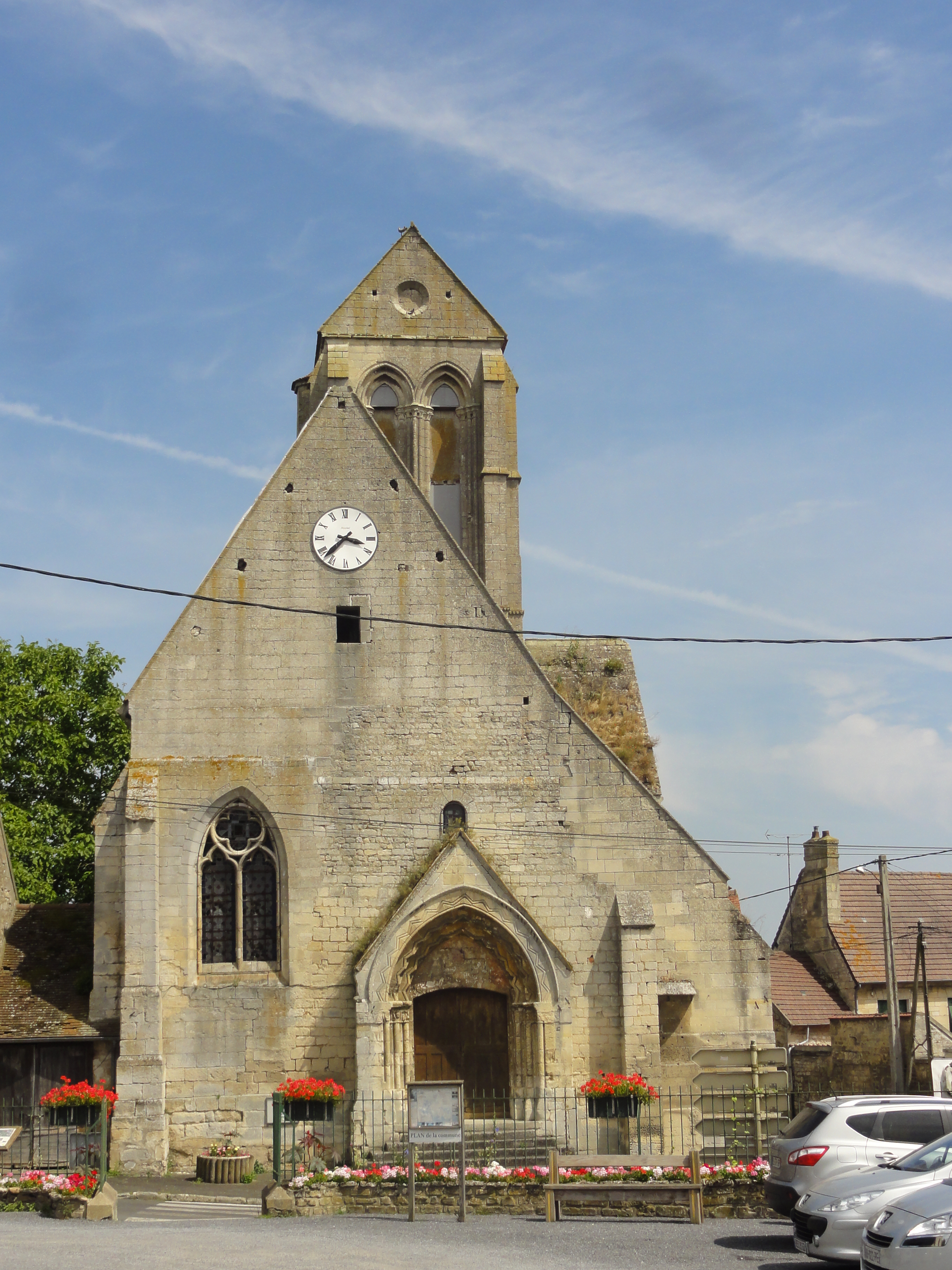 Façade occcidentale.